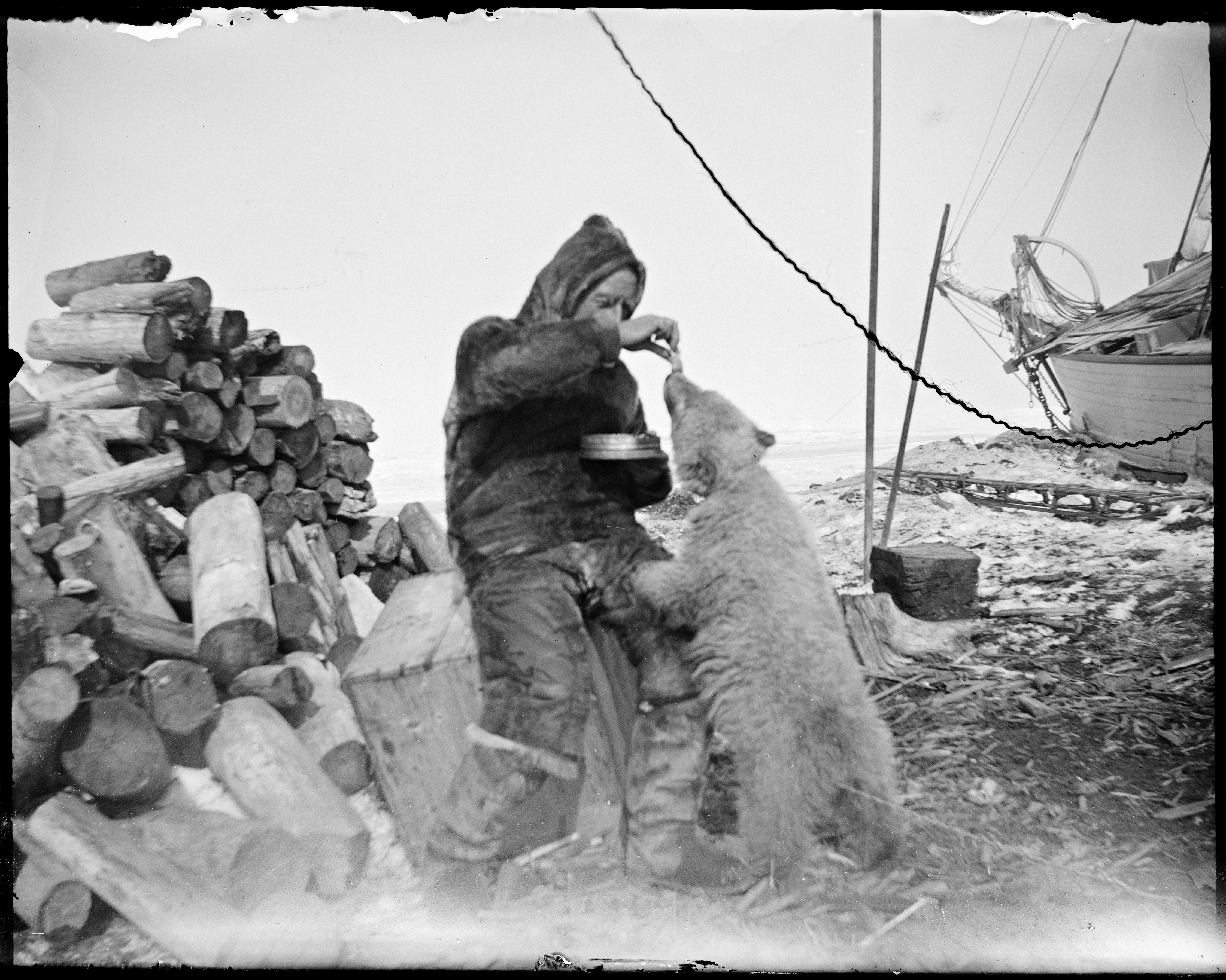 Beskrivelse / Description: Amundsen ville temme isbjørnen for å lære den og trekke slede. Forsøket falt uheldig ut og den ble avlivet. I bakgrunnen ligger "Maud". Dato / Date: juni 1920 / June 1920 Sted / Place: Russland, Tsjukotka, Ajon Fotograf / Photographer: ukjent / unknown Digital kopi av original / Digital copy of original: sv/hv negativ, glass Eier / Owner Institution: Nasjonalbiblioteket / National Library of Norway Lenke / Link: Bildesignatur / Image Number